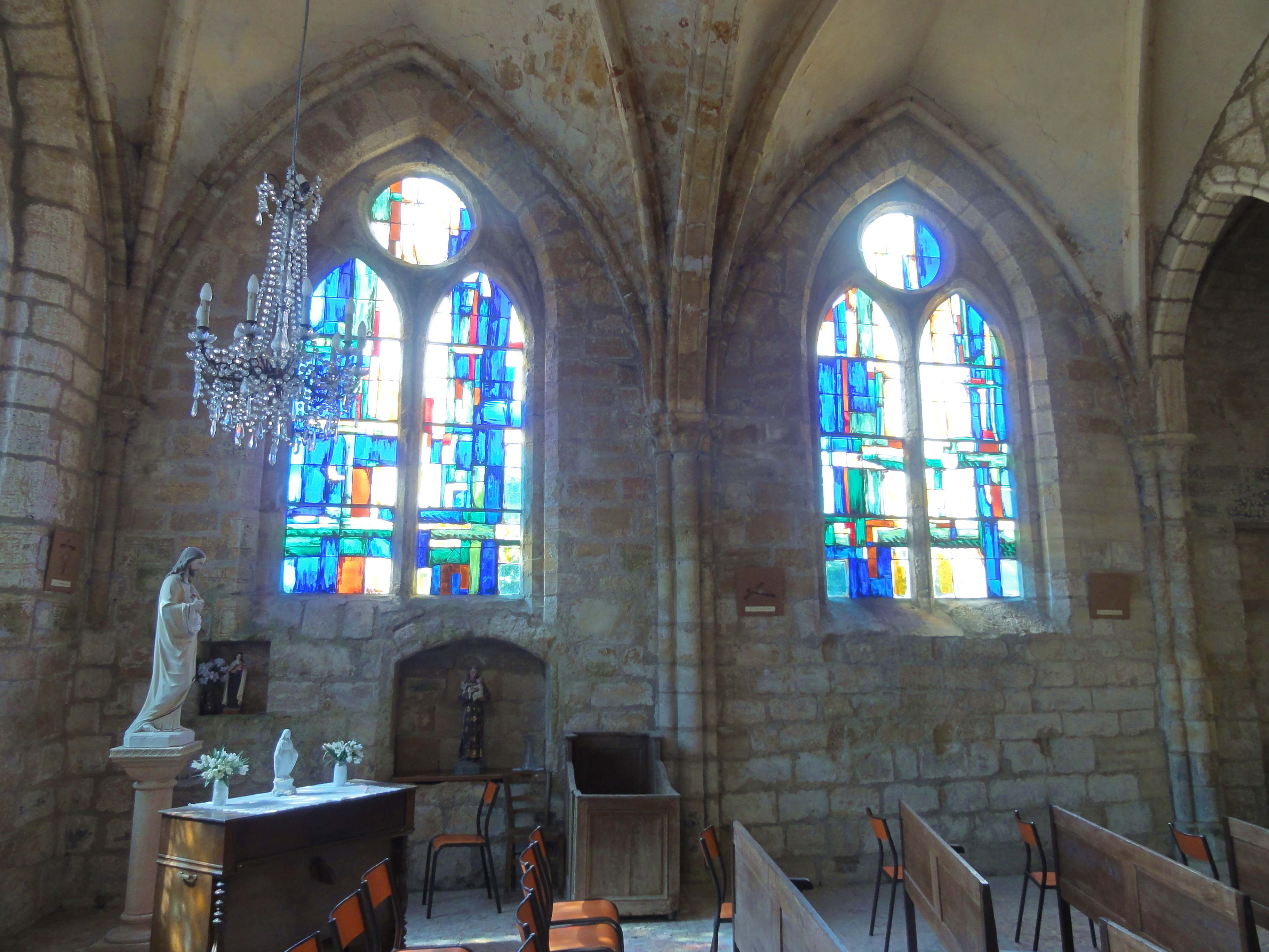 Intérieur de l'église (voir titre).